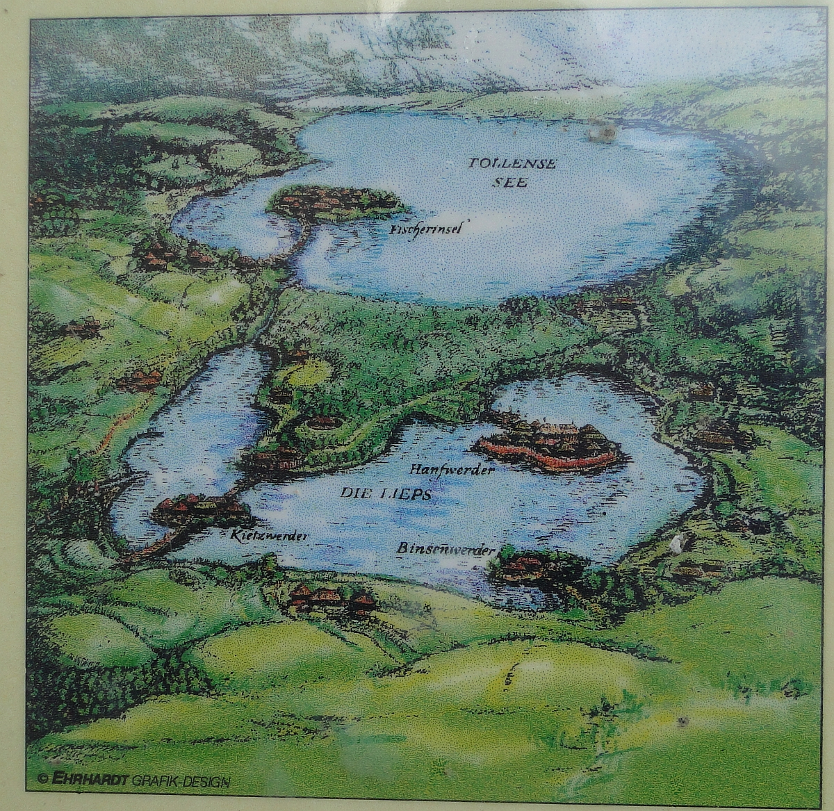 Karte Rethra als Ausschnitt auf der Infotafel Lieps am Jagdschloss Prillwitz. Naturschutzgebiet Nonnenhof, Mecklenburg-Vorpommern. - OpenStreetMap (Info)